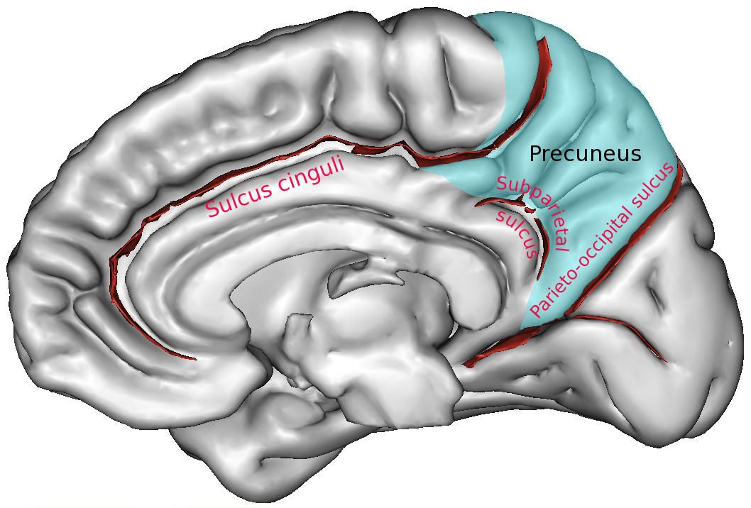 Medial surface of parietal lobe. Gyri and sulci.